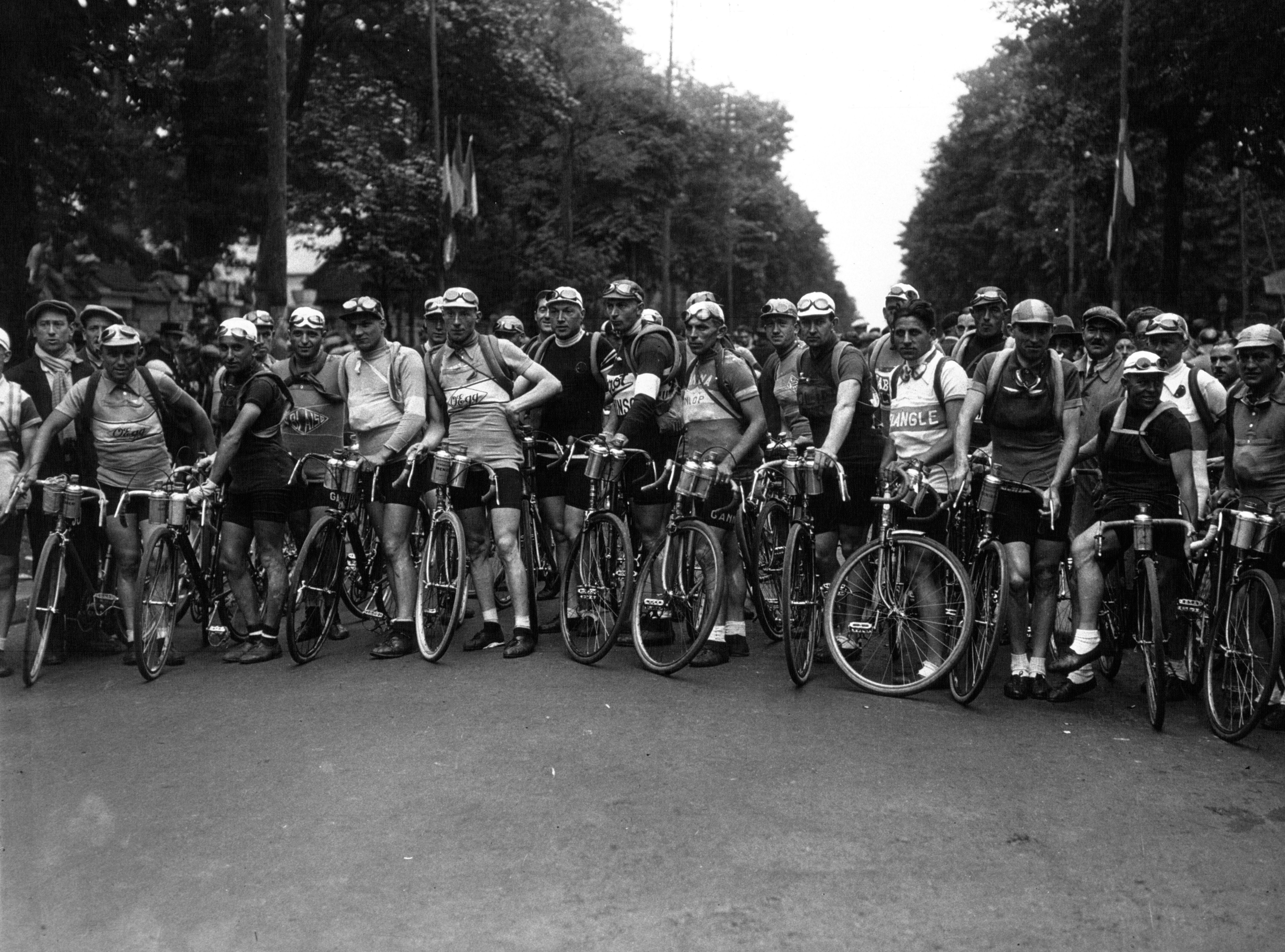 Coureurs individuels au départ du Tour de France 1932